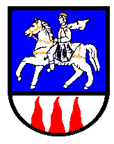 Wappen Duedenbuettel